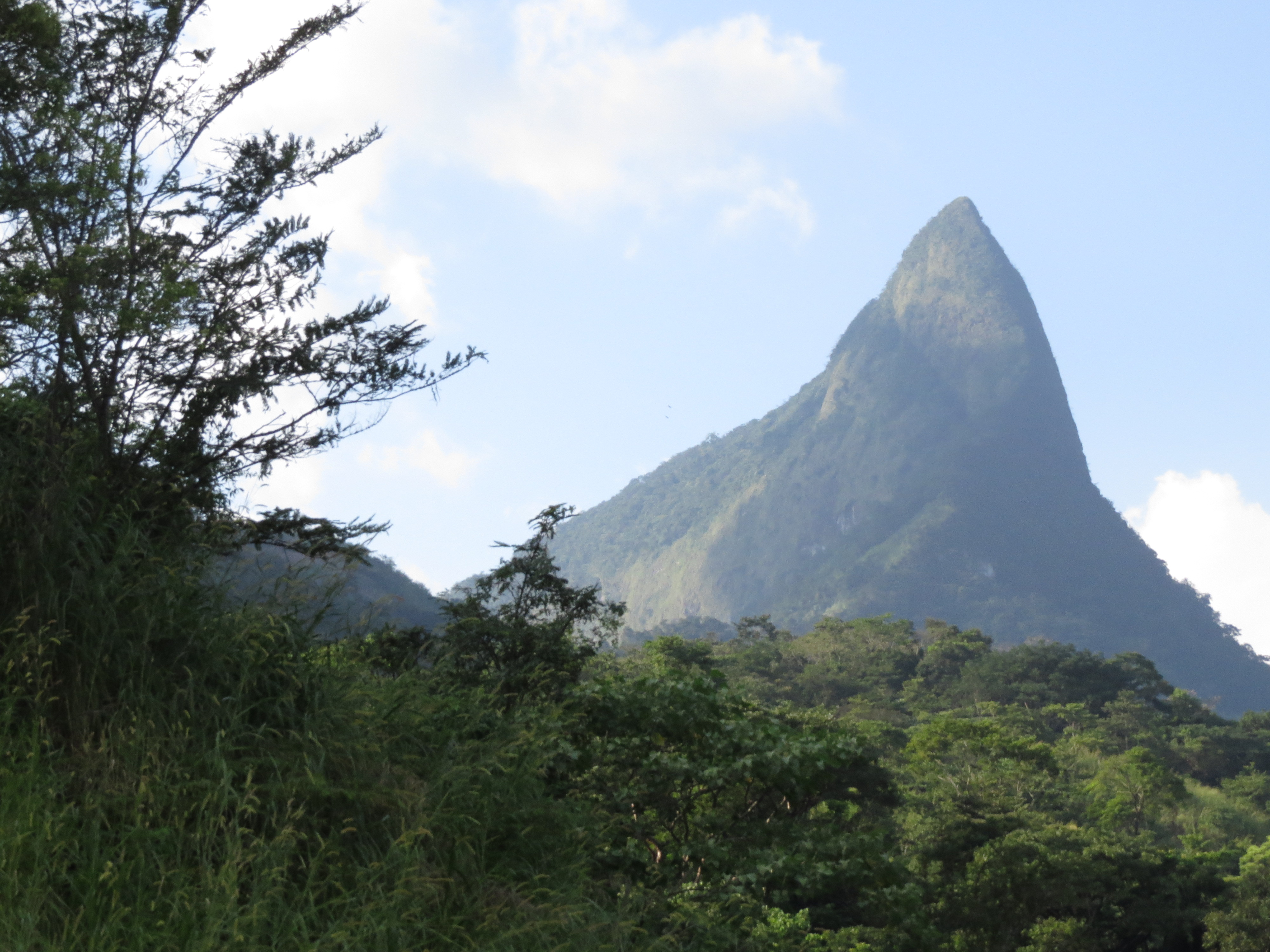 Cerro Mono Pelado, ubicado en el municipio de Huimanguillo, estado de Tabasco, México. Cuenta con una altura de 1 000 m y es el punto más alto de Tabasco.